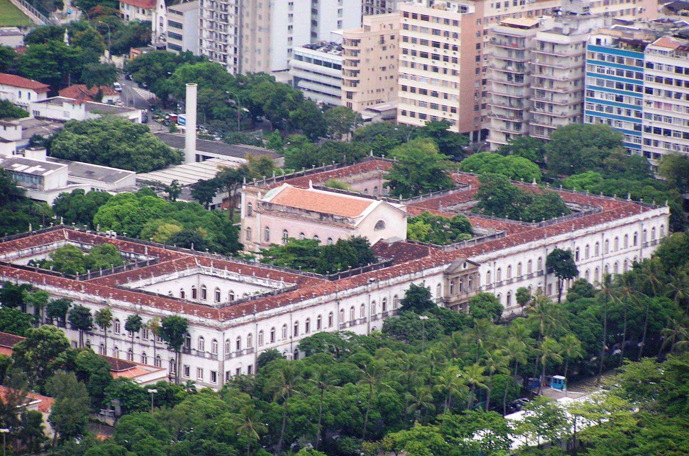 Foto do principal prédio do campus da Praia Vermelha da UFRJ.